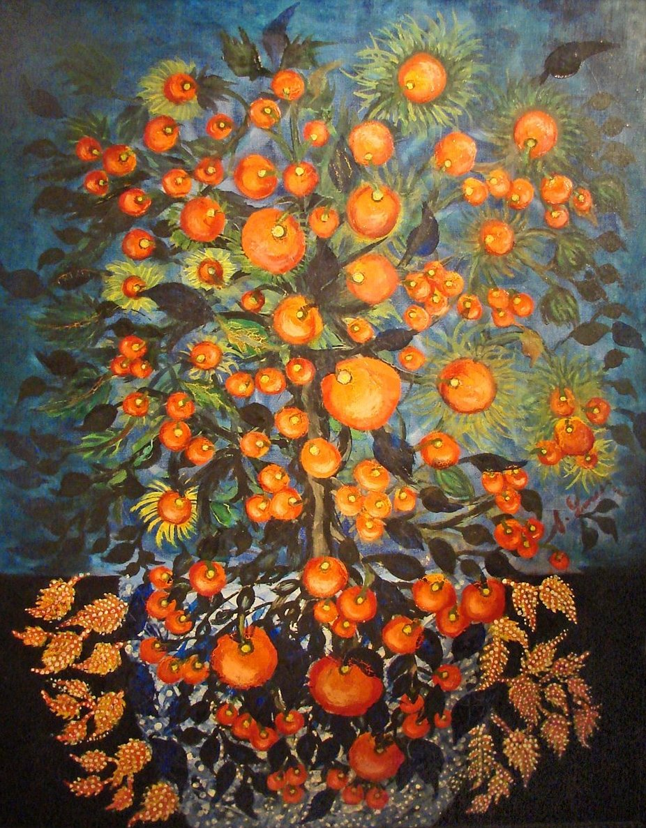 Pommes aux feuilles, 1928-1930 Huile sur toile, 116 x 90 cm Collection Dina Vierny par Séraphine de Senlis exposition au Musée Maillol